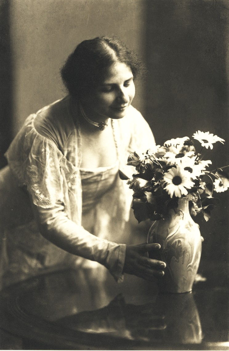 Portrait of Lyriker Ida Dehmel.